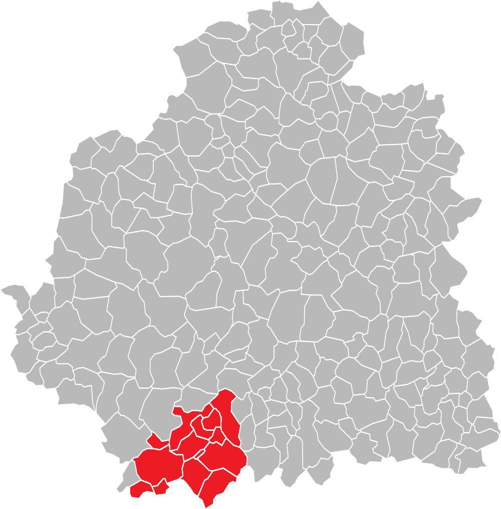 Carte des communes de l'Indre (36) : Le canton de Saint-Benoît-du-Sault, de 1790 à 2015.